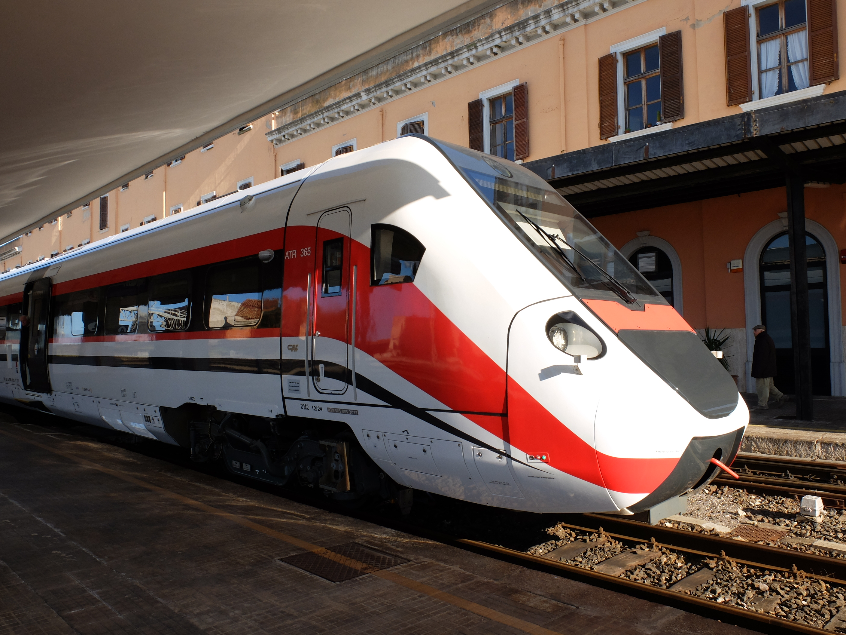 ATR 365 003 in Sassari